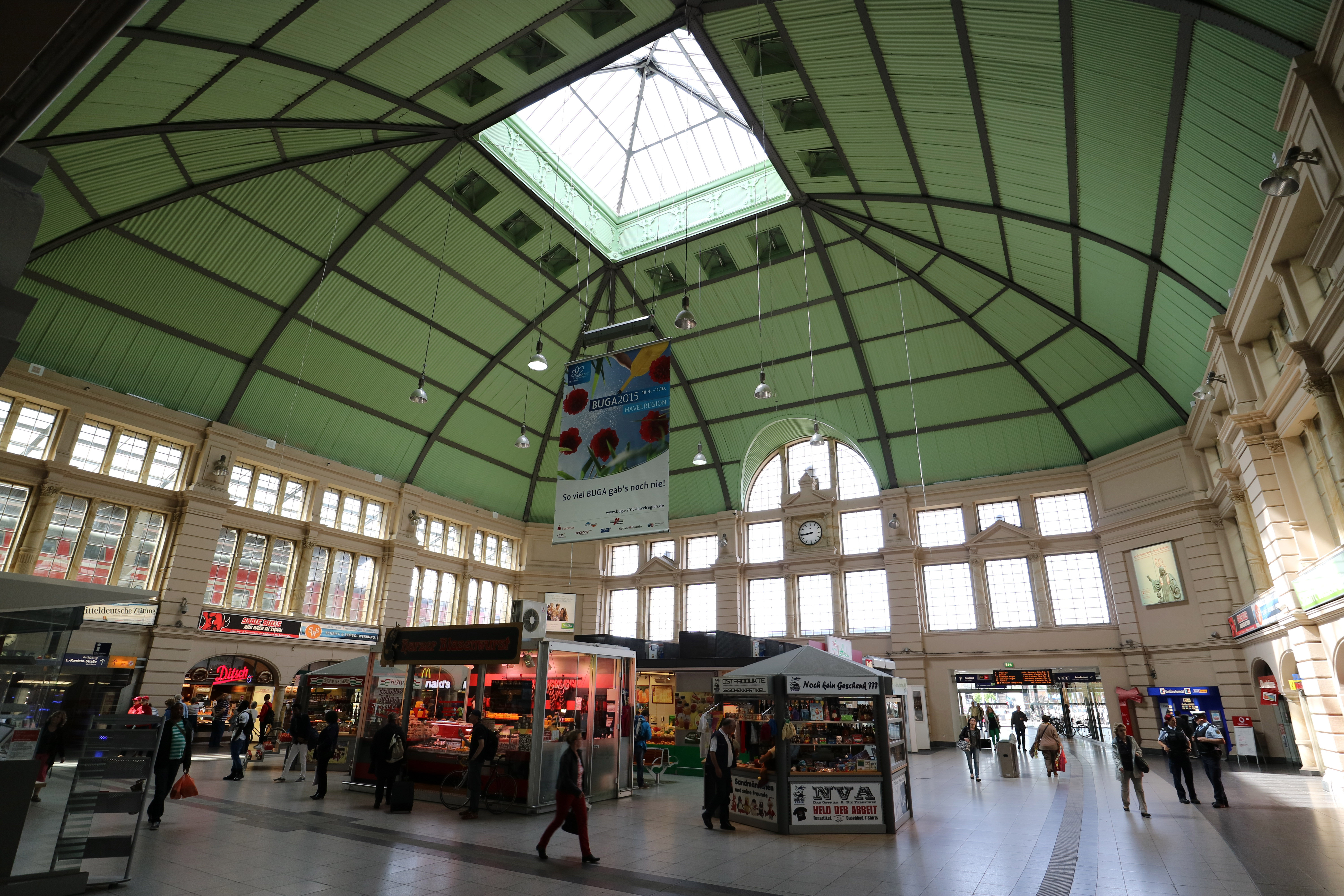 Halle Saale Hbf. Bahnhofskuppel innen